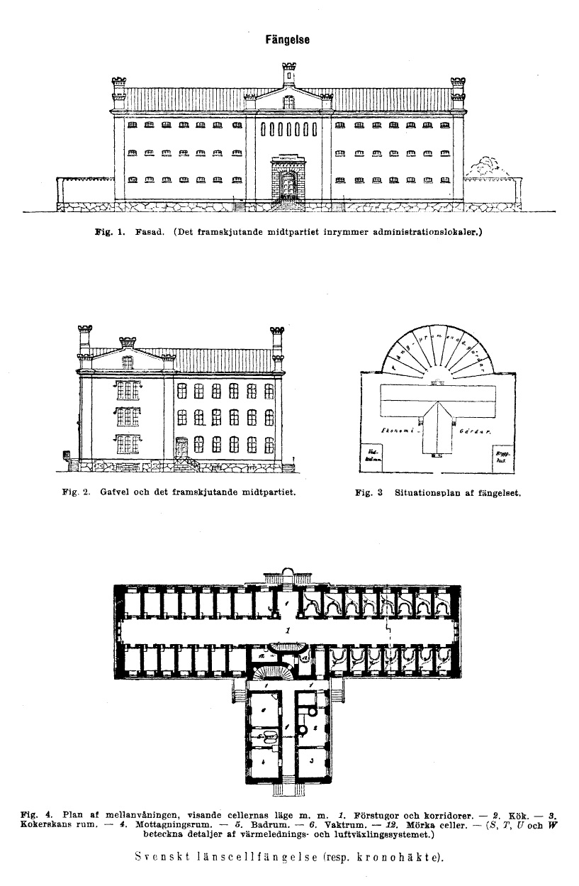 Svenskt Länscellfängelse resp. Kronohäkte. Typritning enligt Philadelfiamodellen från 1840-talet framtagen av arkitekten vid Fångvårdsstyrelsen Carl Fredrik Hjelm